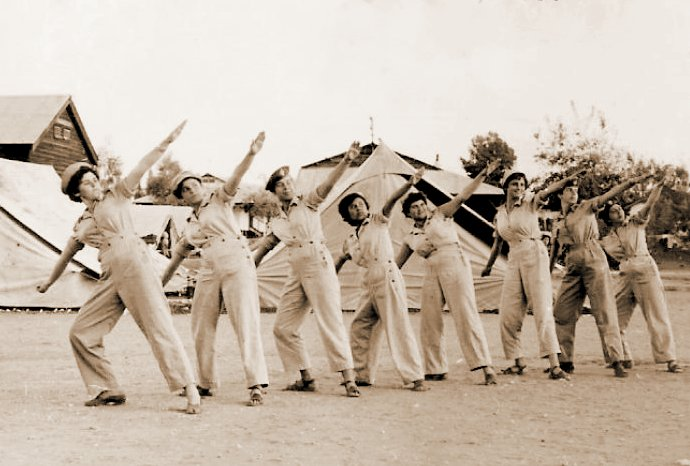 אימון חיילות צה"ל בהטלת רימון במחנה סרפנד (צריפין)